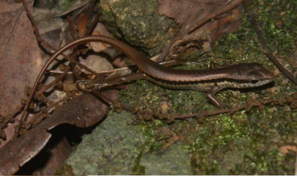 Sphenomorphus incognitus juvenile taken in Tai Po Kau.